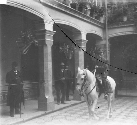 El presidente de la República del Ecuador, Gral. Eloy Alfaro Delgado, montado sobre el corcel presidencial en el patio sur del Palacio de Carondelet (circa 1906).